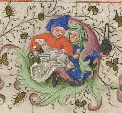 Hs. 400, f. 93r. Detail van marge: Boer die een schaap scheert.